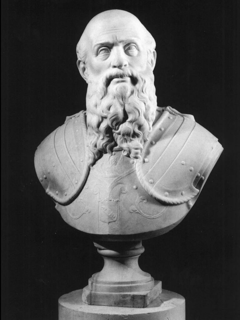 Busto di Paolo Erizzo, opera di Domenico Passerini (1859-1861). Il busto fa parte del Panteon Veneto, conservato presso Palazzo Loredan di Campo Santo Stefano a Venezia